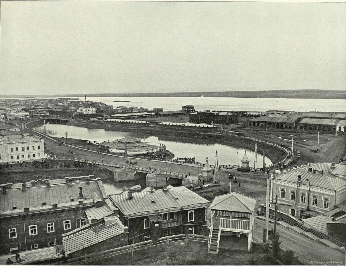 Томск. Общий вид с воскресенской горы на набережную р. Ушайки